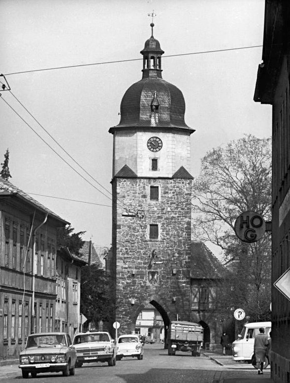 ADN-ZB Ludwig 17.5.74 Bez. Erfurt: Vorbereitung Arbeiterfestspiele Arnstadt, mit 1 270 Jahren der älteste Ort der DDR, ist Festspielort der diesjährigen Arbeiterfestspiele im Bezirk Erfurt. Die Stadt ist reich an Zeugen der Vergangenheit. Das Riedtor (Foto) gehört zu den alten Befestigungsanlagen und erwiest sich heute als Engpaß für die Fernverkehrsstraße Nr. 4, die in den Thüringer Wald führt. - Die Kreisstadt am Nordrand des Thüringer Waldes zählt heute ca 30.000 Einwohner. Ihre Industrieerzeugnisse - fernmeldetechnische Anlagen aus dem RFT Fernmeldewerk und Chemieanlagen aus dem Chemieanlagenbau Erfurt-Rudisleben - sind durch die ökonomische Integration in den sozialistischen Ländern bekannt und geschätzt. (Weitere Fotos dazu: N0417-16N, 15N und 14 N)